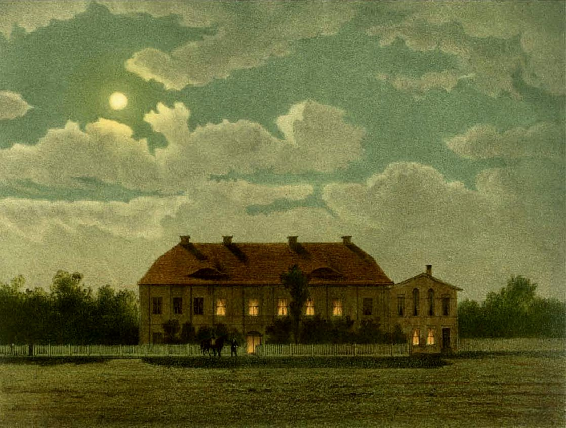 Gut Blankenfelde, Kreis Teltow, Provinz Brandenburg